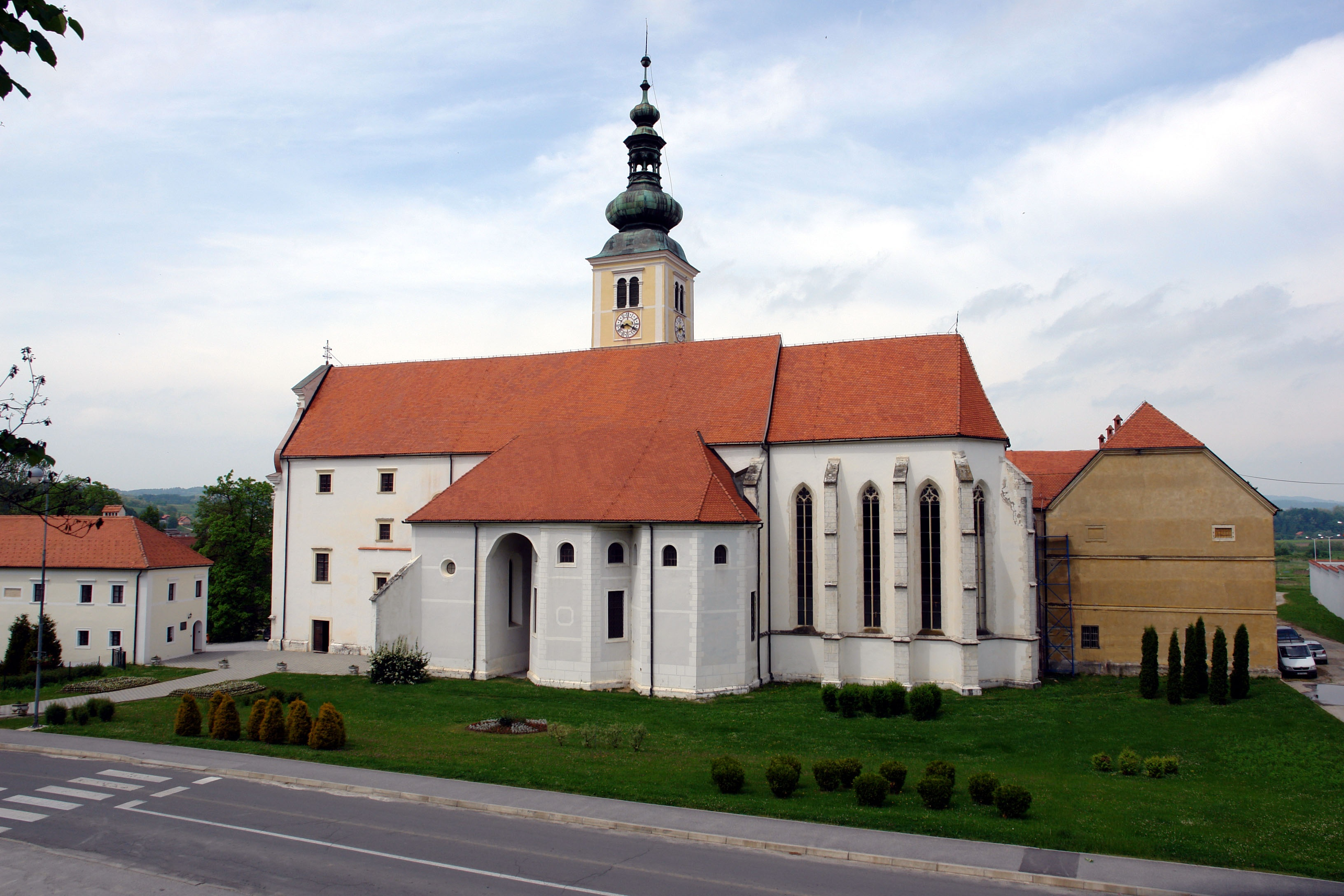 Lepoglava, pálos templom és kolostor. Z-882 Lepoglava Crkva Bezgrešnog začeća Blažene Djevice Marije, bivši pavlinski samostan i Gostinjac